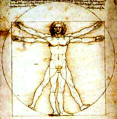 A imagem é uma mitologia grega.